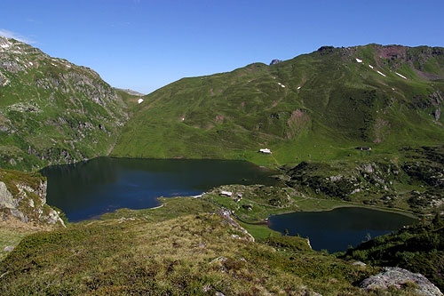 Ober Murgsee